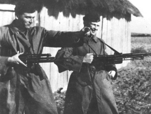 Żołnierze oddziału "Jędrusiów" z ręcznymi karabinami maszynowymi przed kwaterą w "Wygwizdowie". Od lewej: Andrzej Skowroński "Andrzej", "Inspektor".